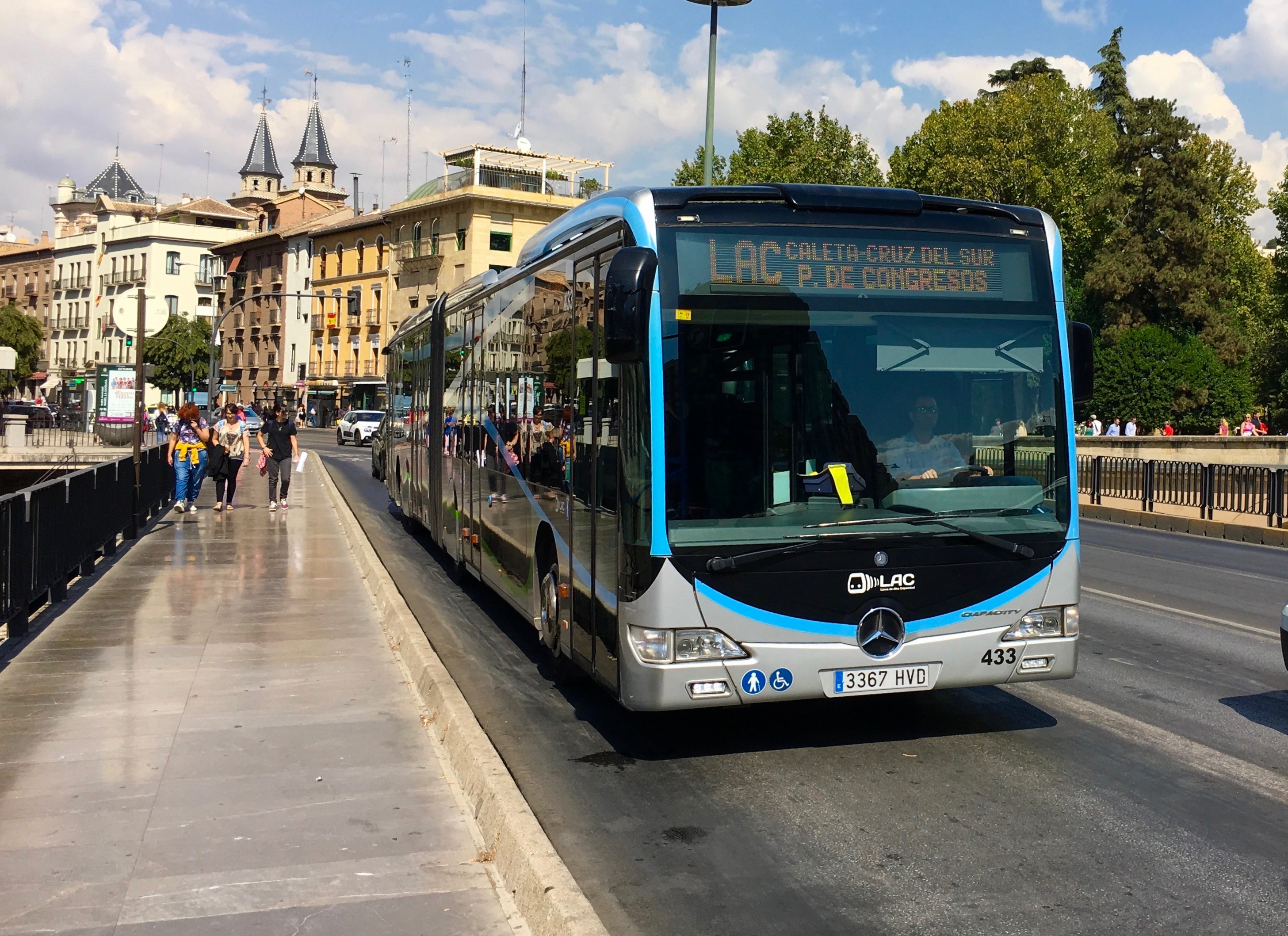 Un bus de la Línea de Alta Capacidad (LAC) de Granada cerca de la parada de Puente Blanco.